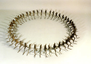 Escultura de la artista colombiana María Fernanda Cardozo